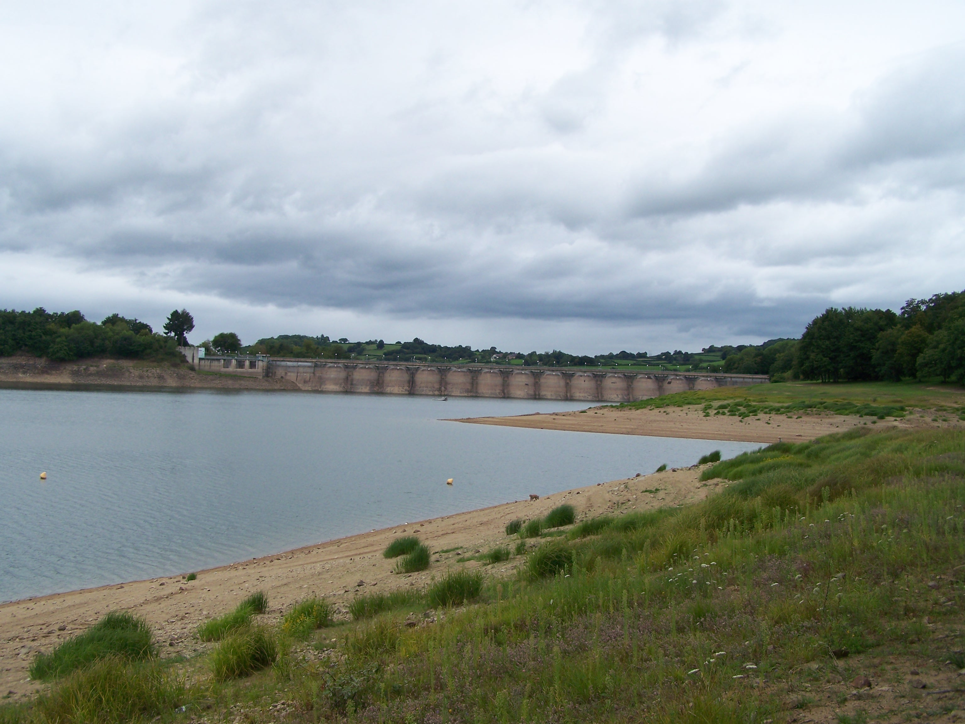 Vue du lac de Pannecière (Nièvre, France) et de son barrage hydroélectrique en août 2011, lors d'une vidange partielle du lac.